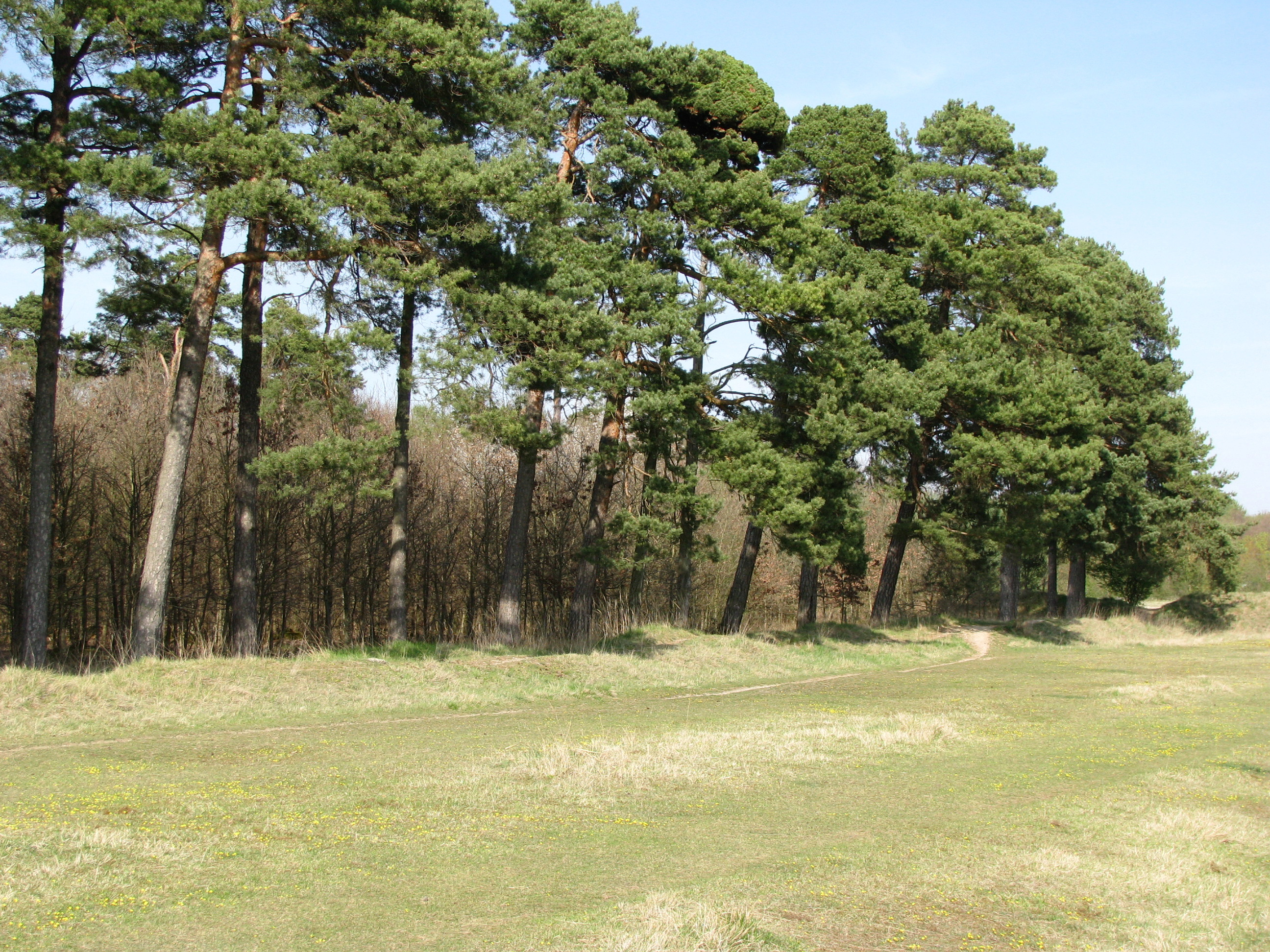 Hartelholz, Südrand, im Übergang zur Panzerwiese